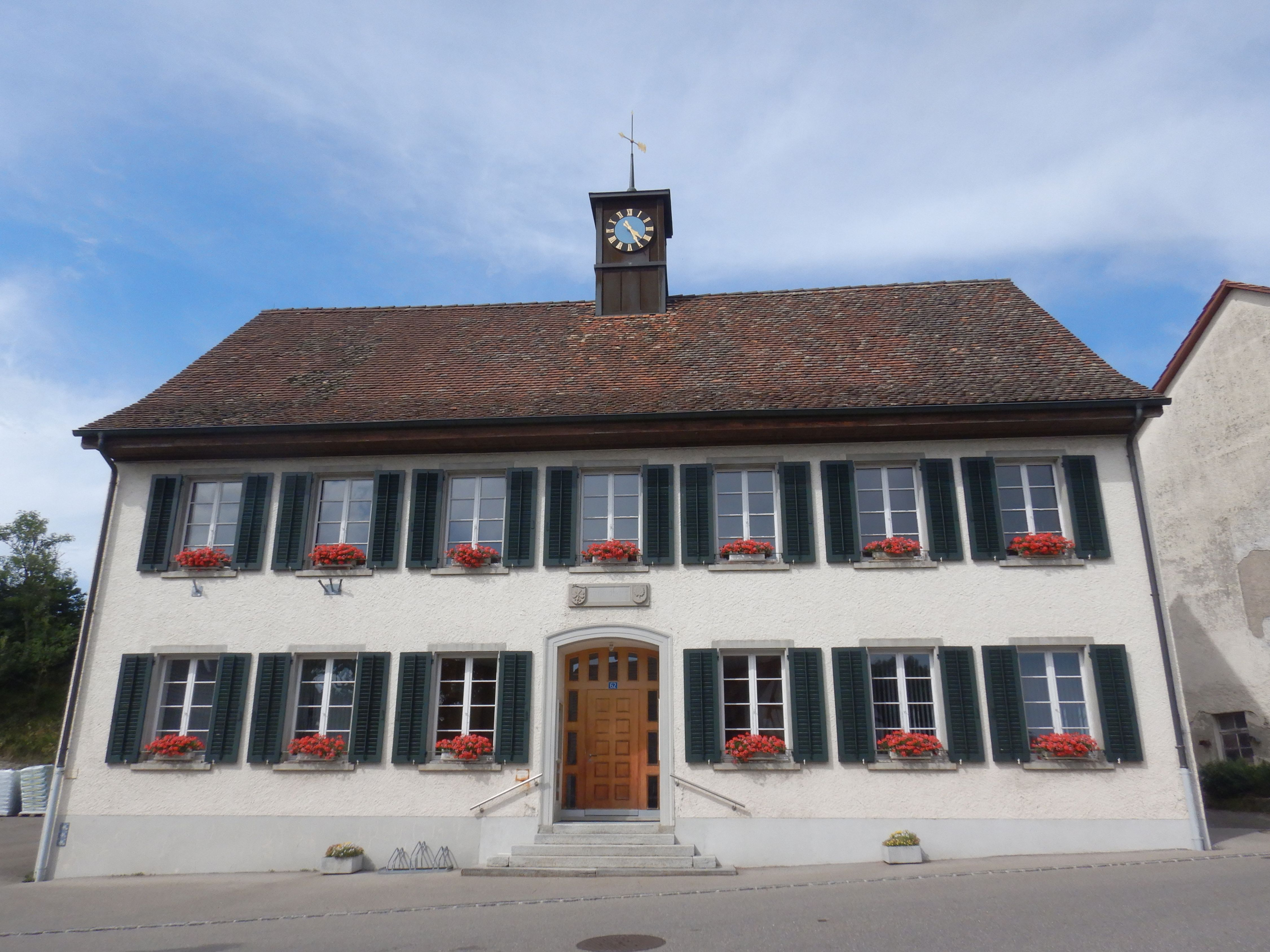 Gemeindehaus von Buchberg SH, Schweiz.